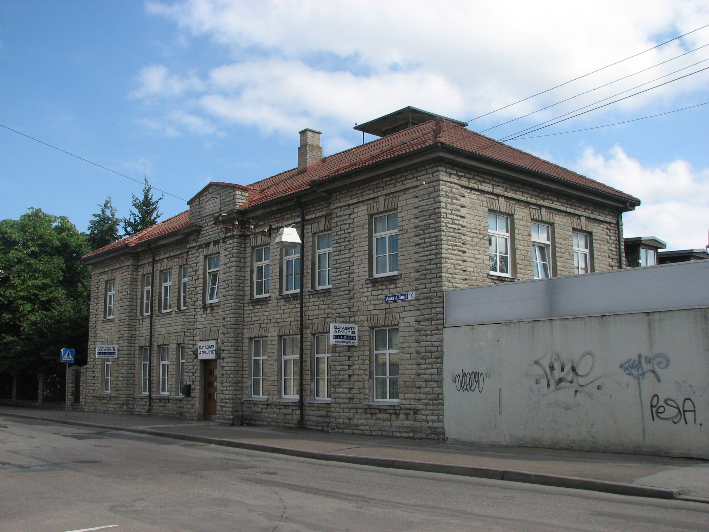 A.M.Luther Vineeri- ja Mööblivabriku tuletõrjedepoo 1912. aastast. Vana-Lõuna 19 Tallinnas.